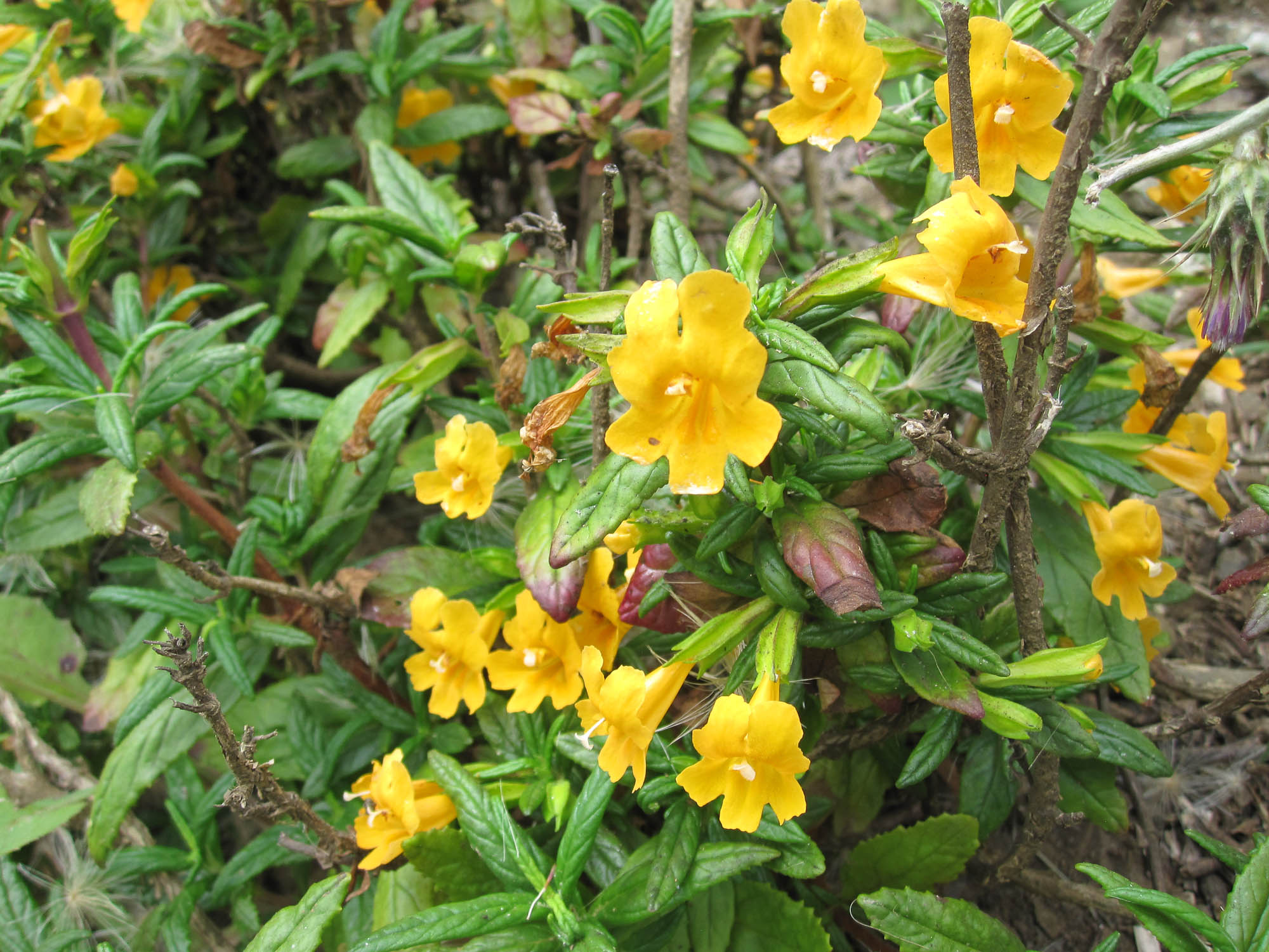 Mimulus moschatus